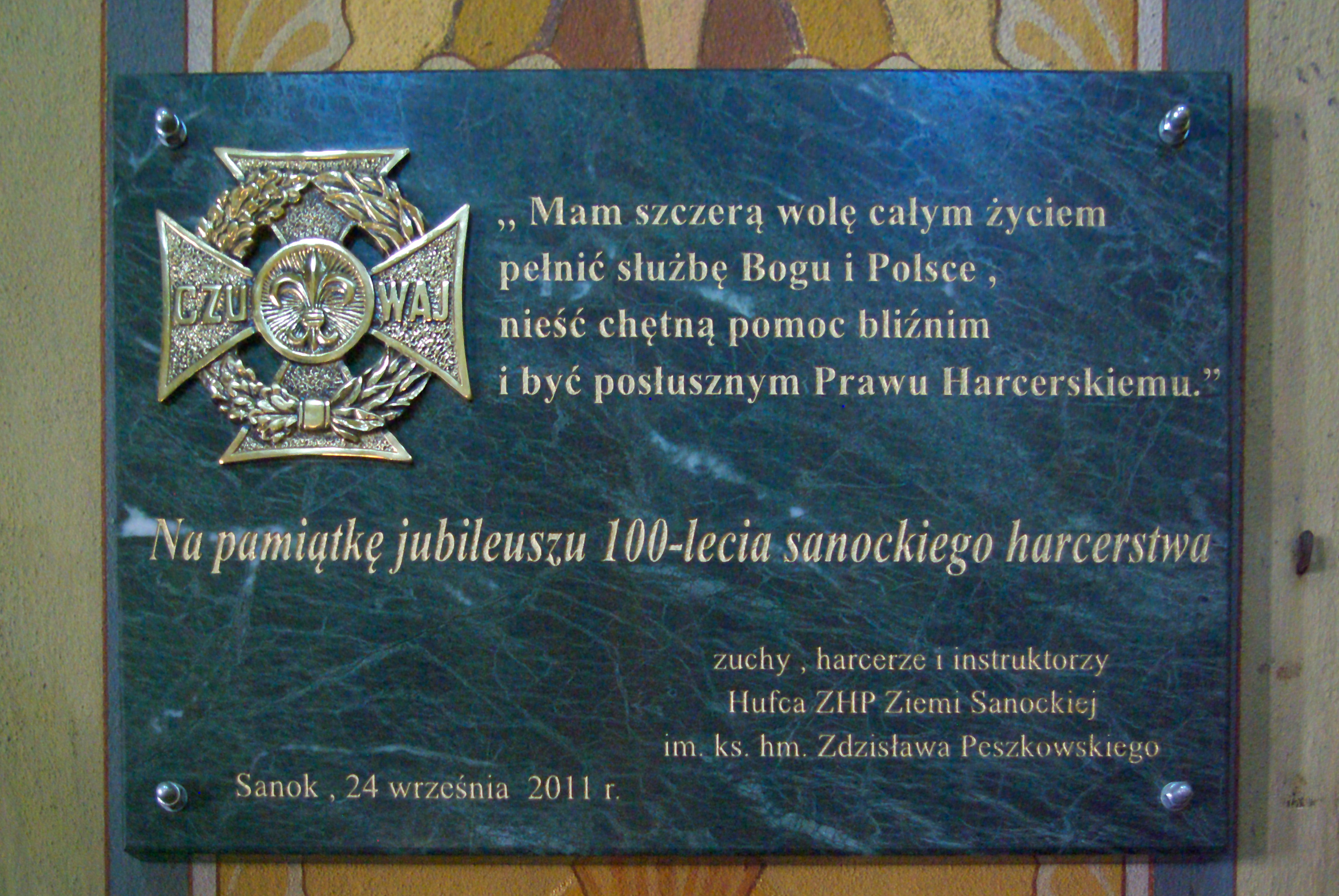 Kościół Przemienienia Pańskiego w Sanoku. Tablica pamiątkowa harcerstwo